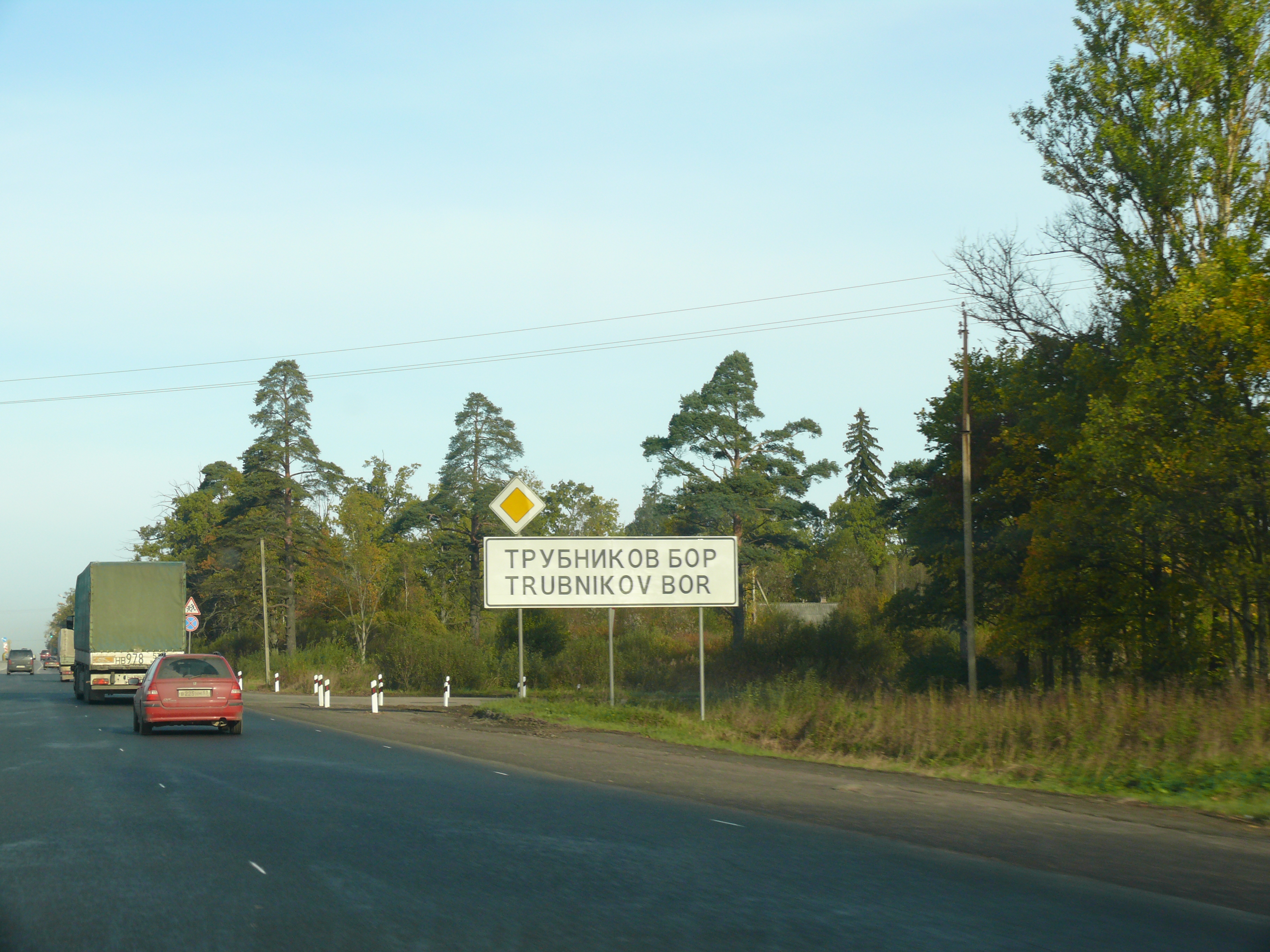 Деревня Трубников Бор, Тосненский район Ленинградской области